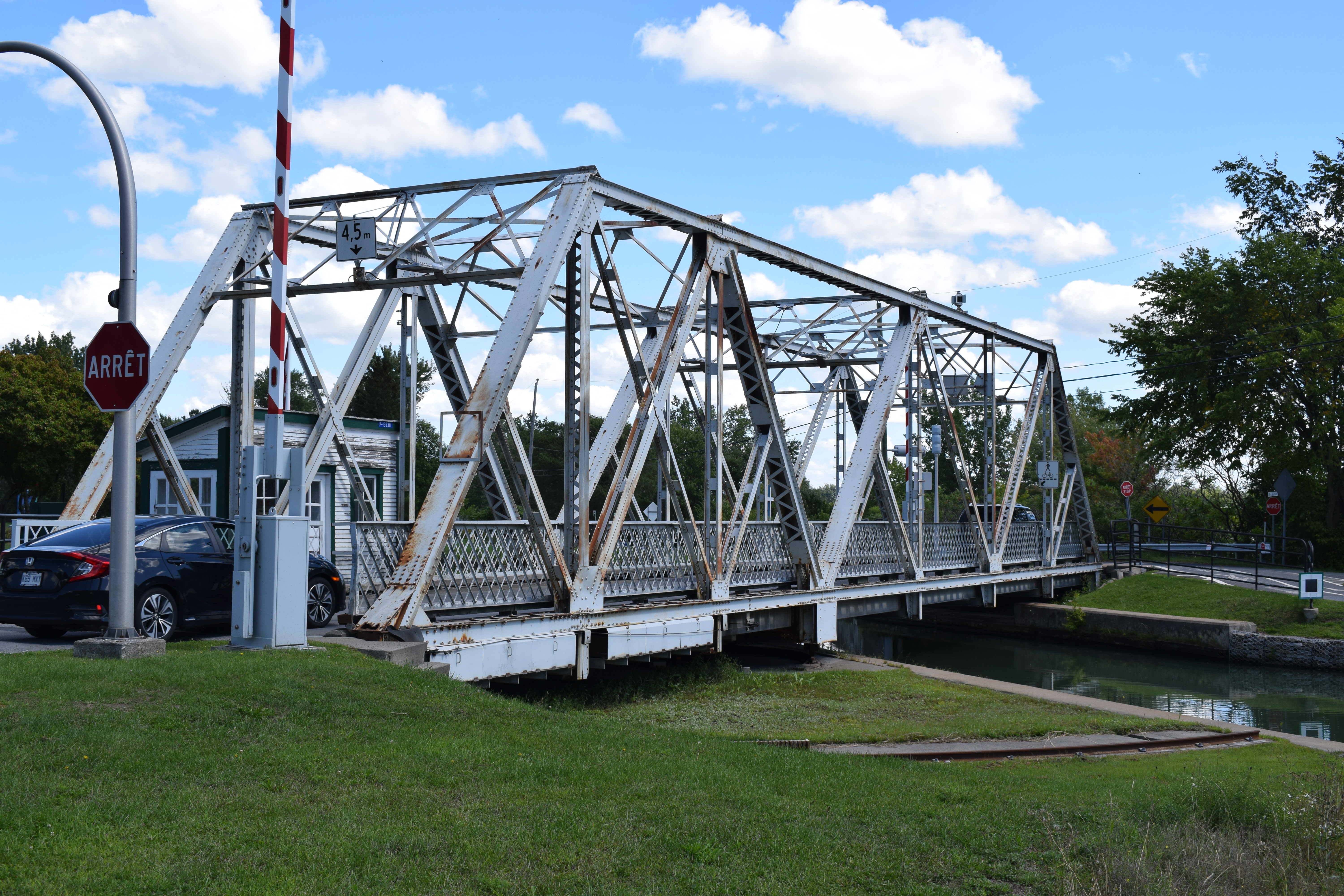 pont numéro 7 à Chambly, Québec